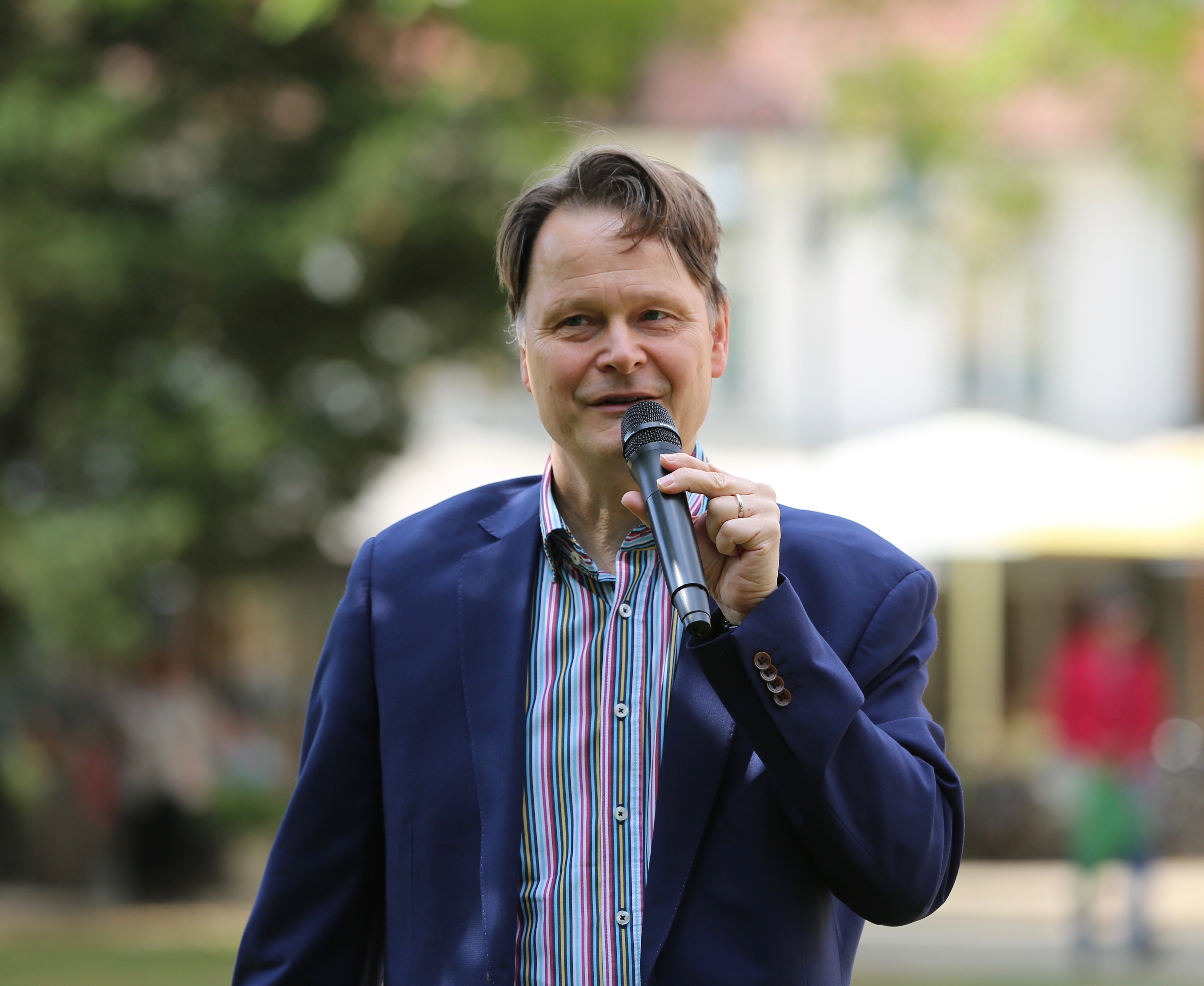 Rolf-Bernhard Essig beim Erlanger Poetenfest 2018